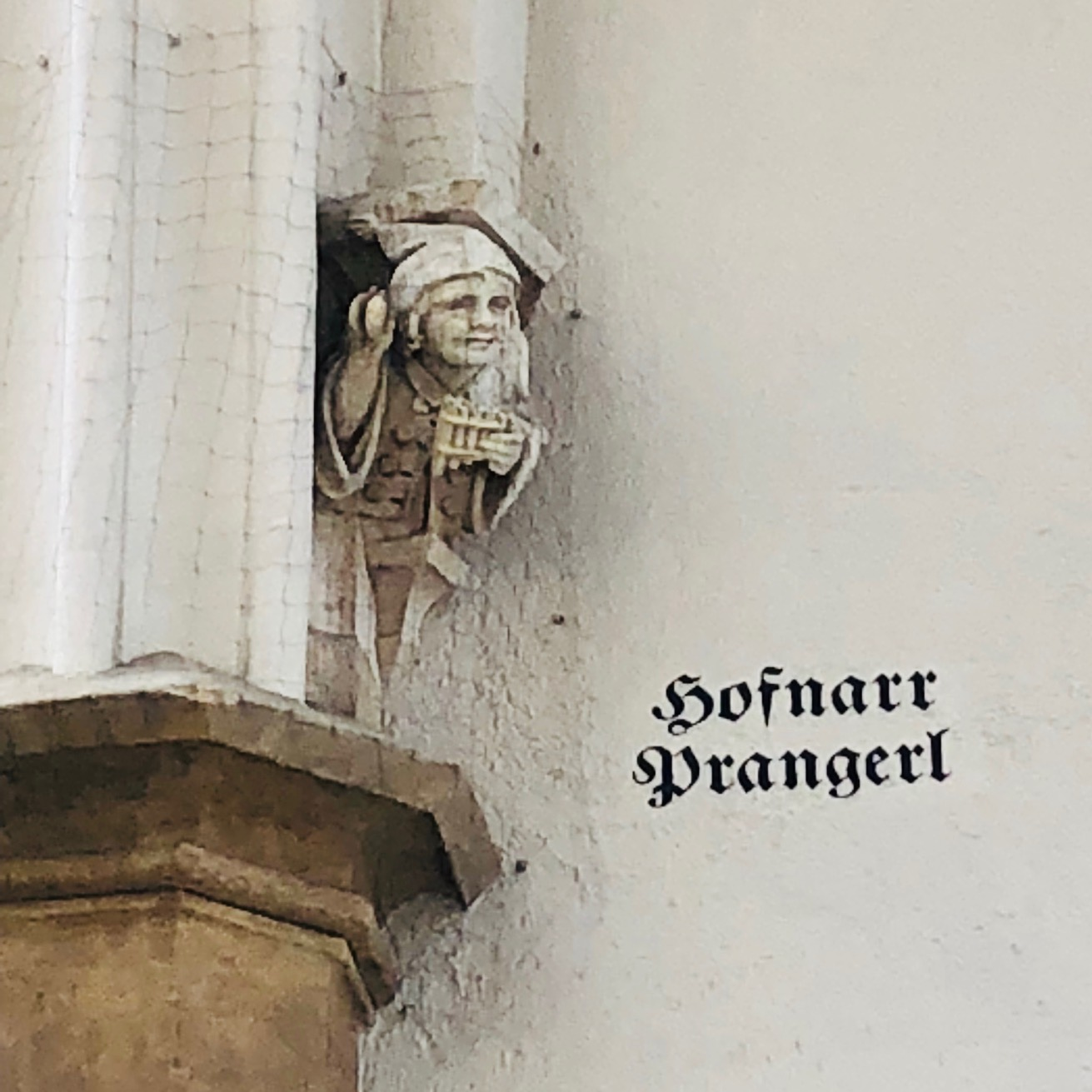 Mittelgewölbe Karlstor Stachus, Darstellung des Hofnarr Prangerl